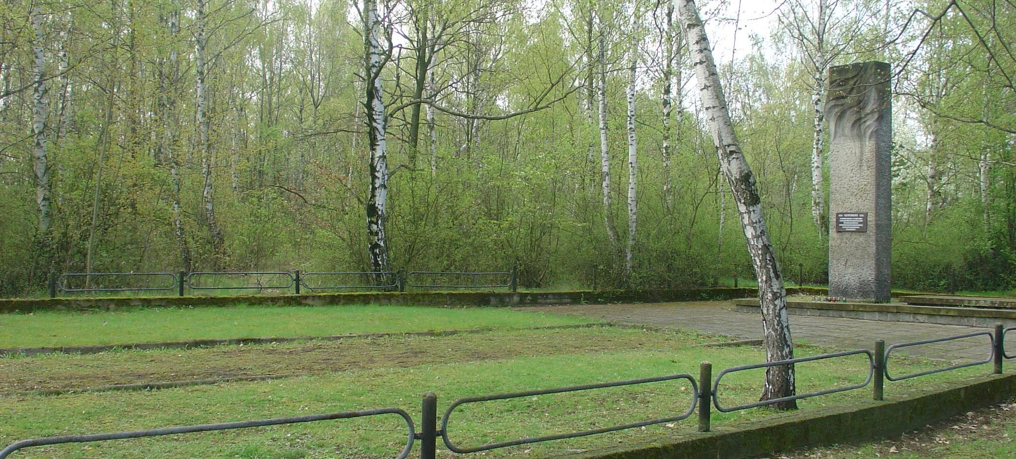 Stalag VIII A Zgorzelec/Görlitz. Pomnik ku czci uwięzionych.